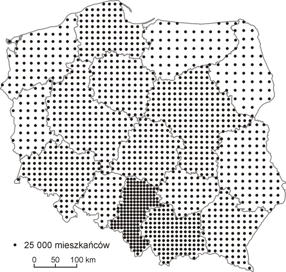 Mapa kropkowa z zastosowanym kartogramicznym sposobem rozmieszczenia kropek – mapa rozmieszczenia ludności Polski w 2013 roku